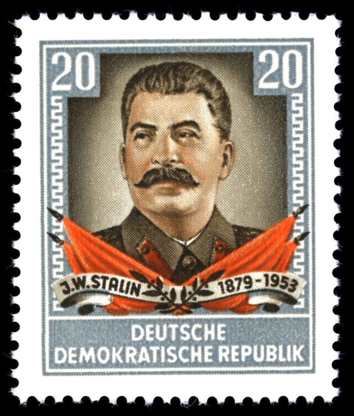 Information: Ausgabepreis: Pfennig First Day of Issue / Erstausgabetag: Auflage: Entwurf: Druckverfahren: Michel-Katalog-Nr: Ländercode-MiNr